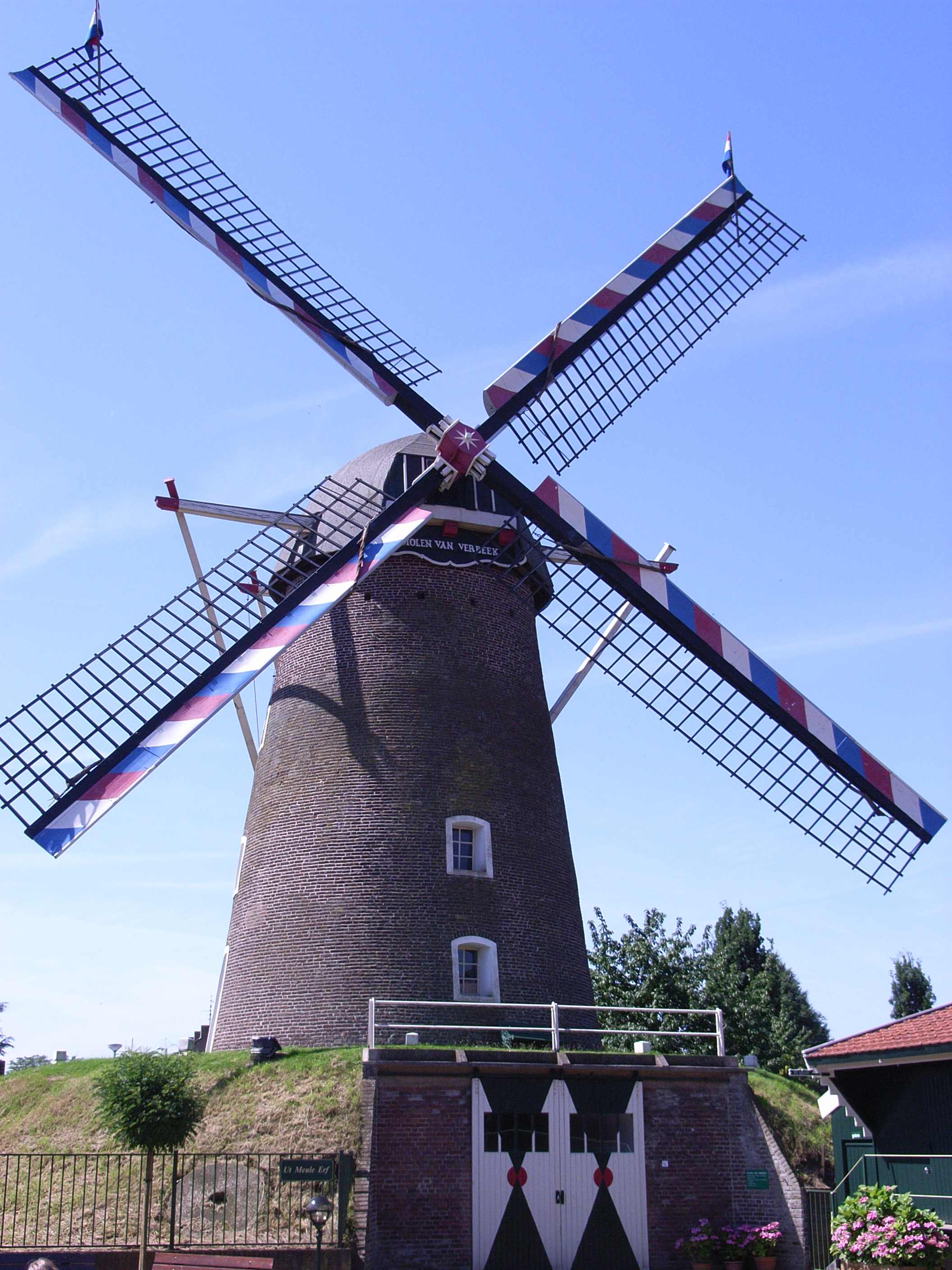 Windmill, St. Odilienberg, Roerdalen, NL